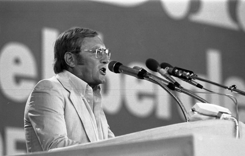 Außerordentlicher Bundesparteitag der FDP in Freiburg.